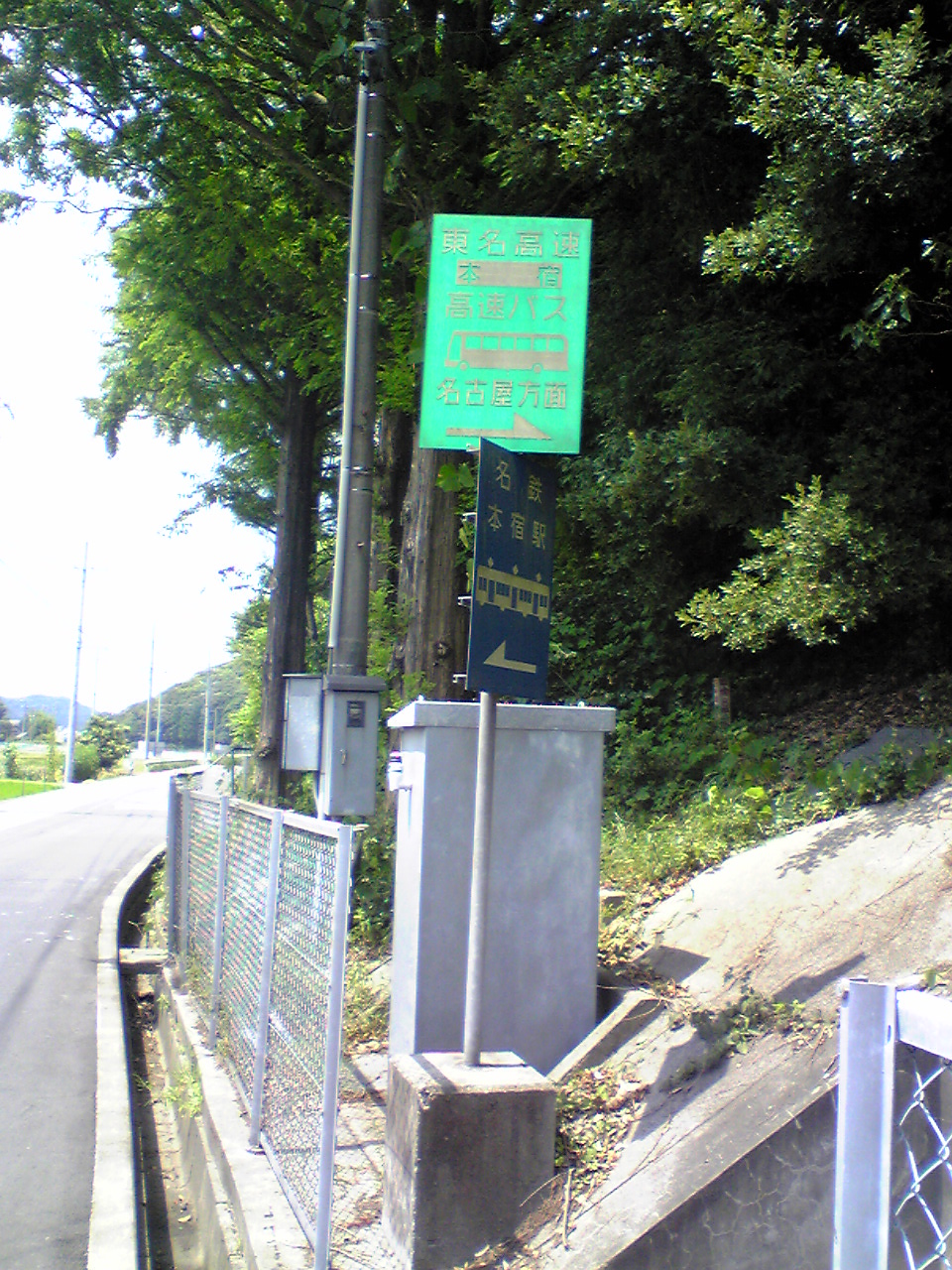 東名ハイウェイバスの本宿バスストップ入口（下り線）。名鉄本宿駅に近い当バス停には、名鉄本宿駅への案内標識も同時に立つ。